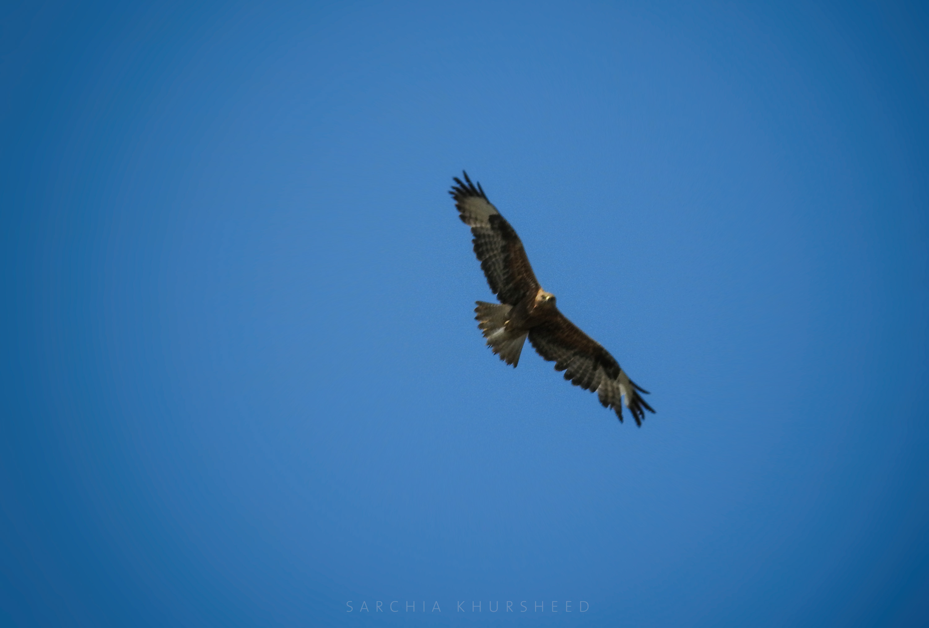 کوردی: بازێک لە کوردستان